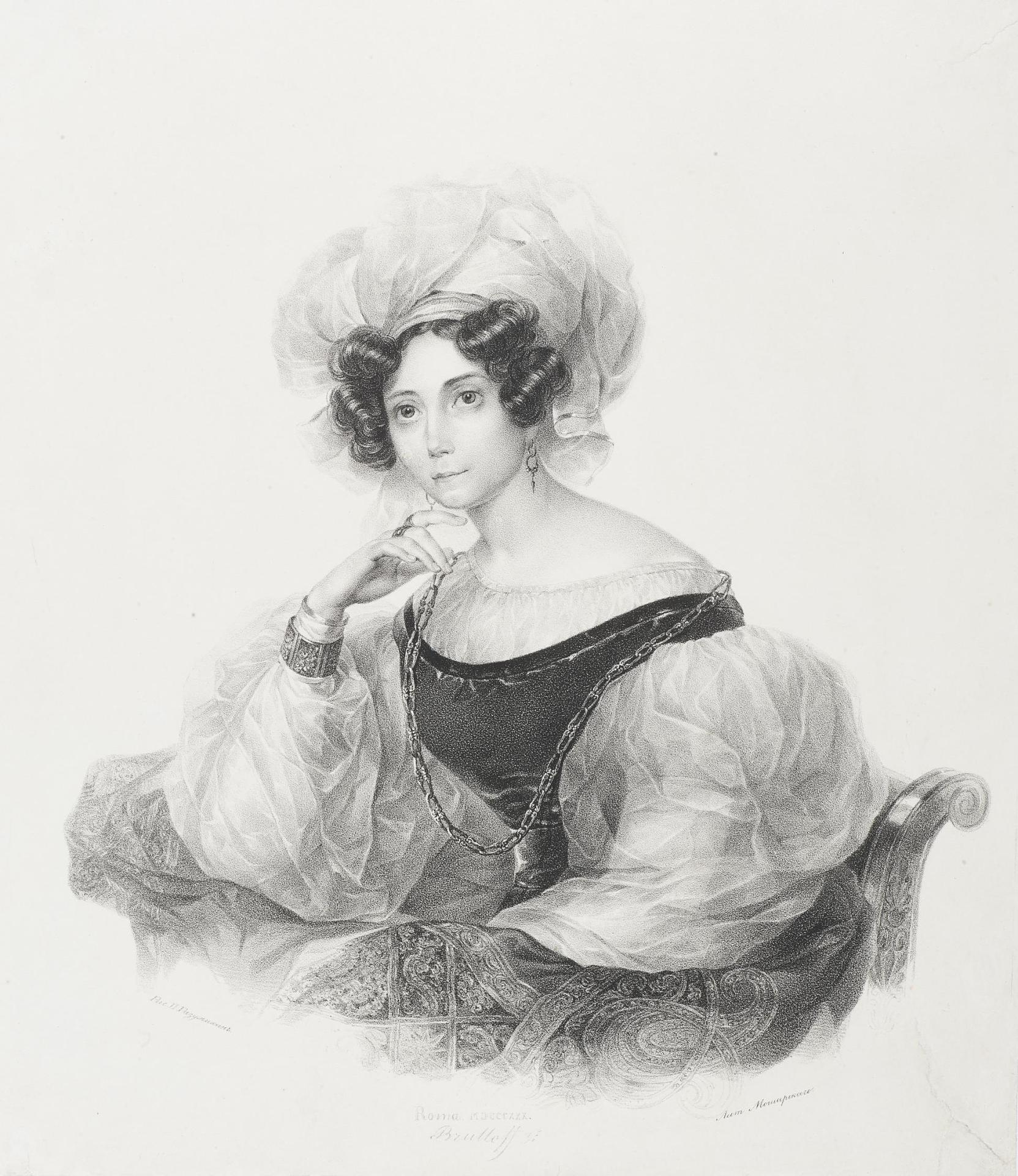 Zinaida Volkonskaya Портрет З. А. Волконской Эрмитаж. бумага Техника: литография Размеры: 30х25,6 см Поступление: Поступил из Музейного фонда Инвентарный номер: ЭРГ-28784